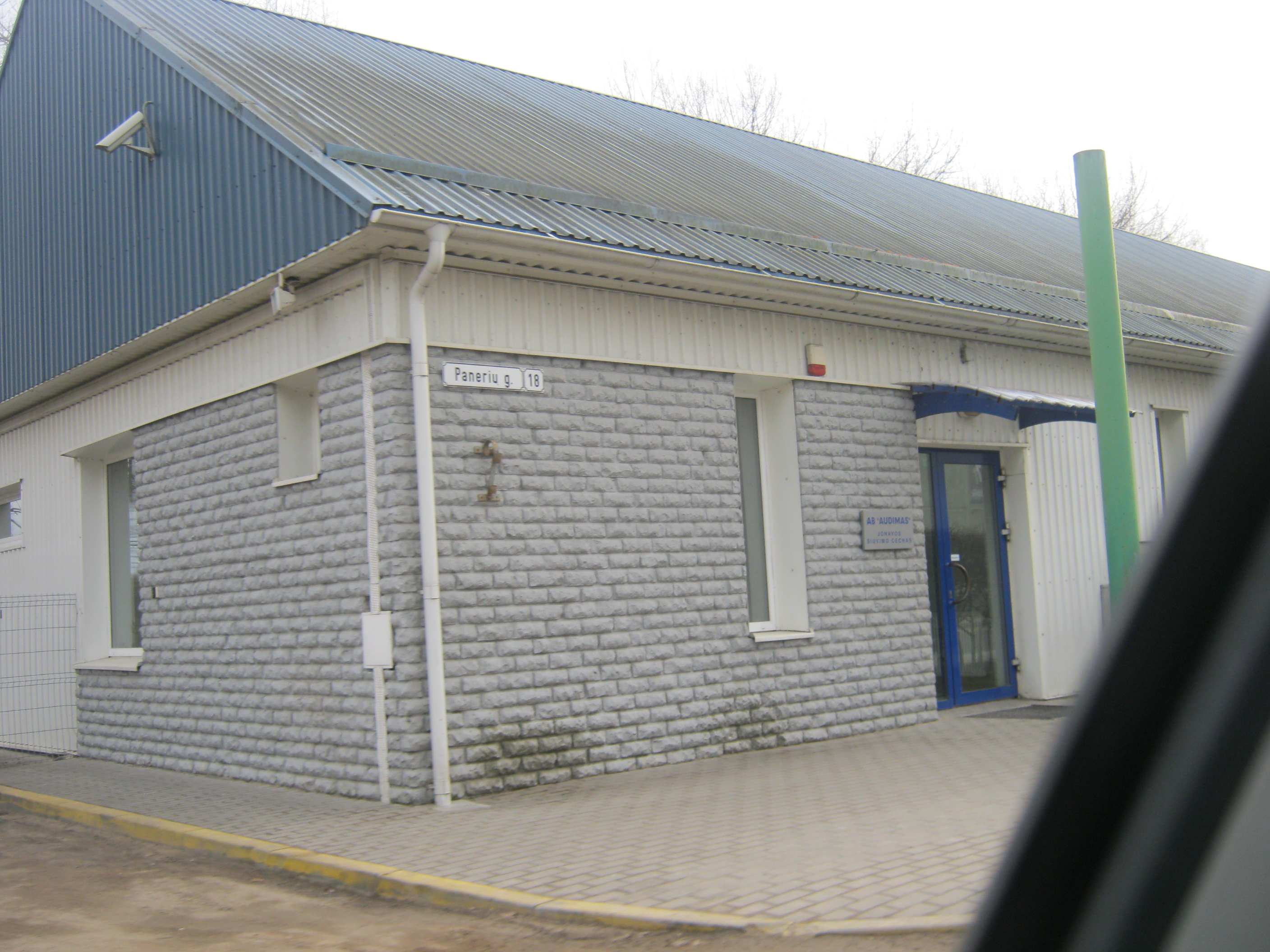 Jonava